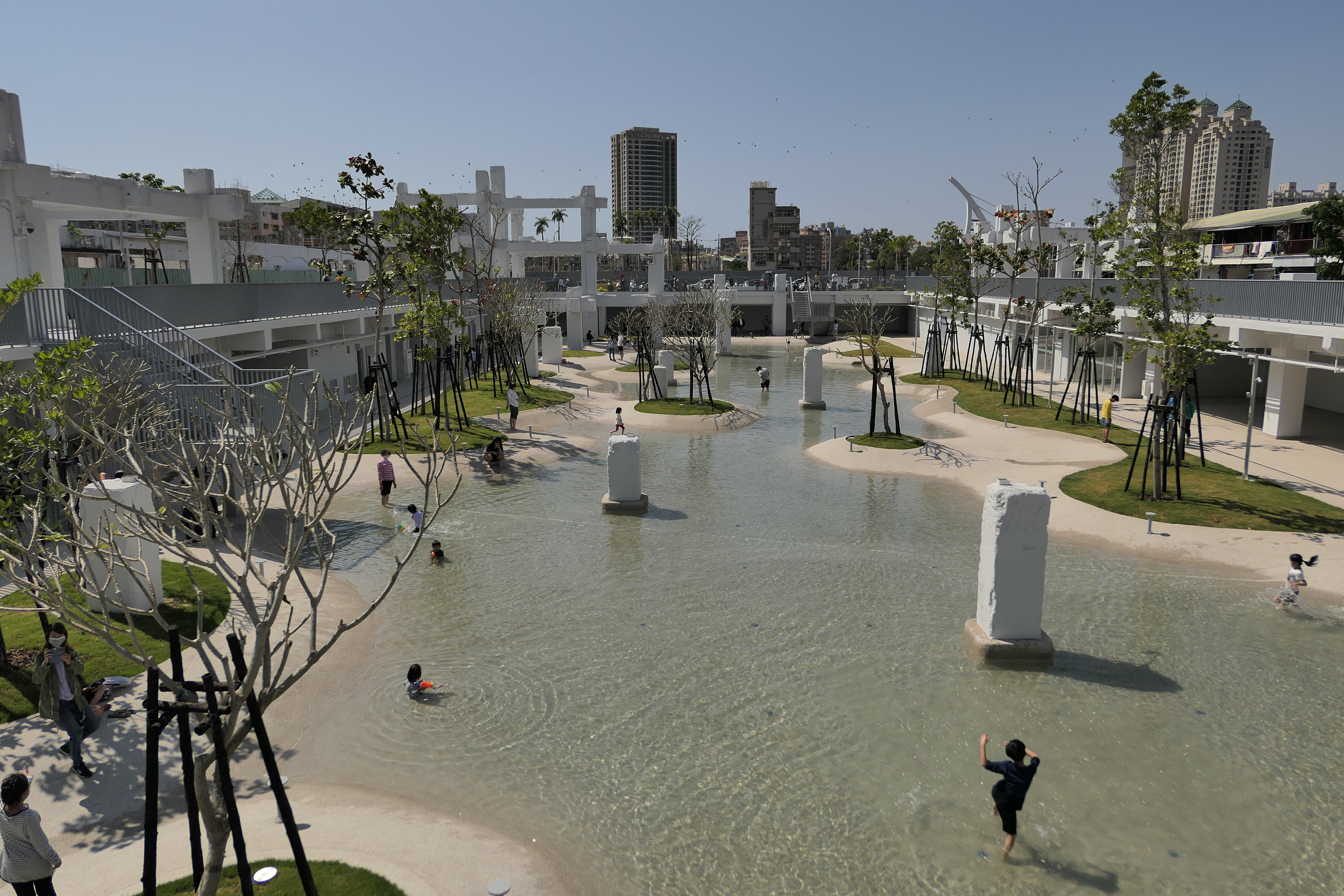 臺南中國城拆除後，原址改建而成的河樂廣場